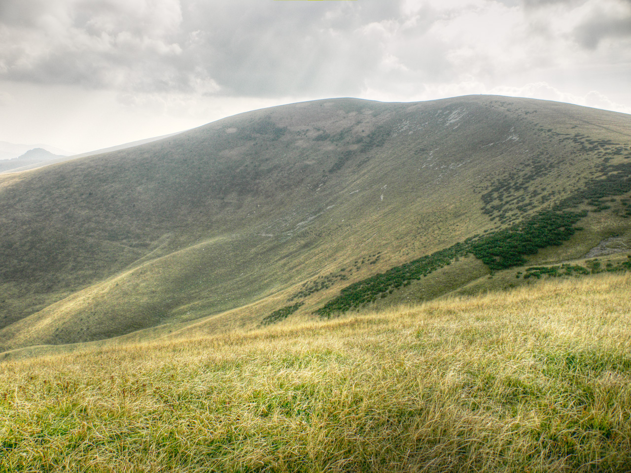 Ostredok in the Veľká Fatra, Slovakia, North-Eastern slope